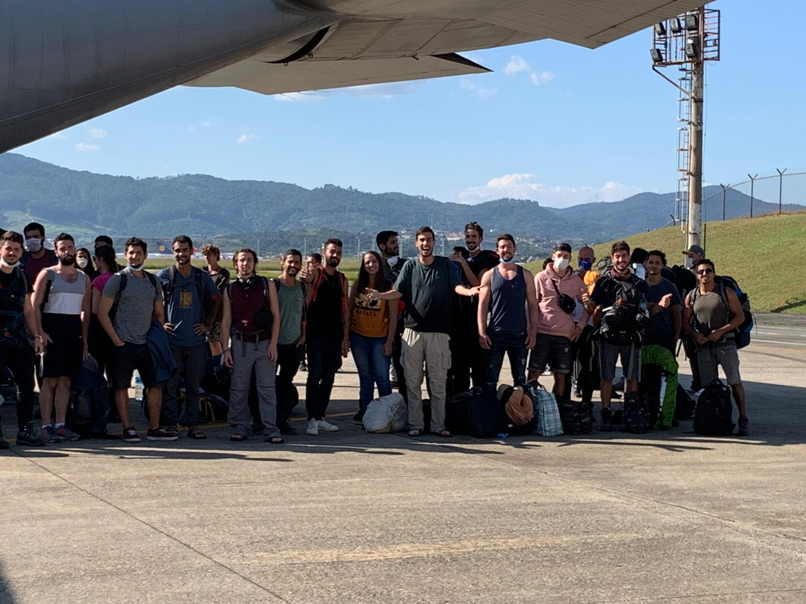 Israel repatria cidadãos na Bolívia